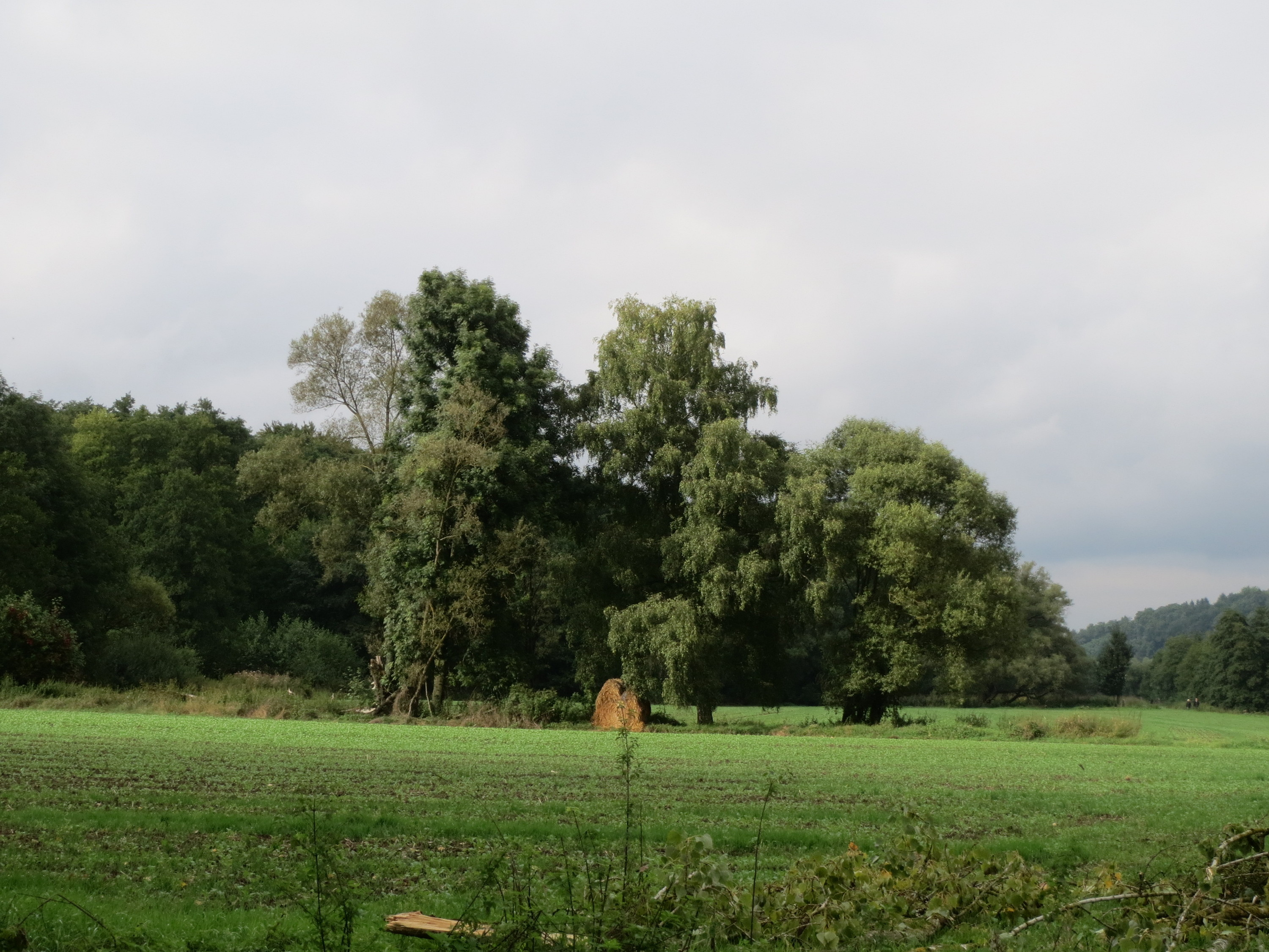 An der Saar bei Grosbliederstroff